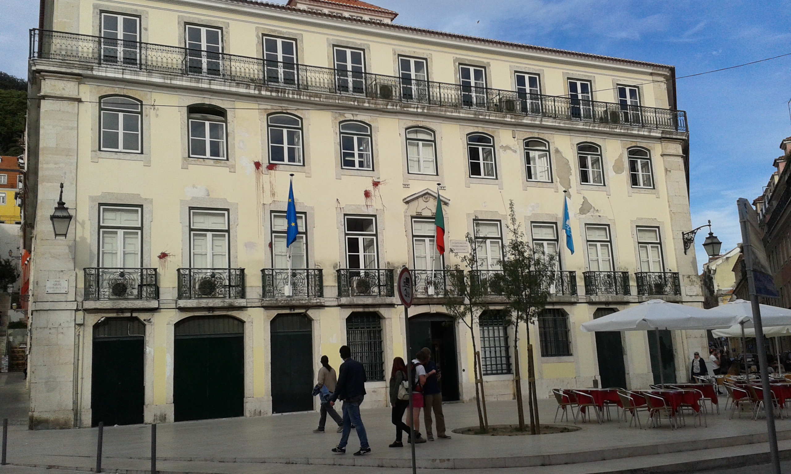 Façade du siège national du CDS – Parti populaire, Largo Adelino Amaro da Costa à Lisbonne, photographié par mes soins le 6 mai 2015.